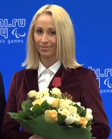 Трёхкратная паралимпийская чемпионка и трехкратный серебряный призёр Паралимпийских игр в биатлоне и лыжных гонках Михалина Лысова.